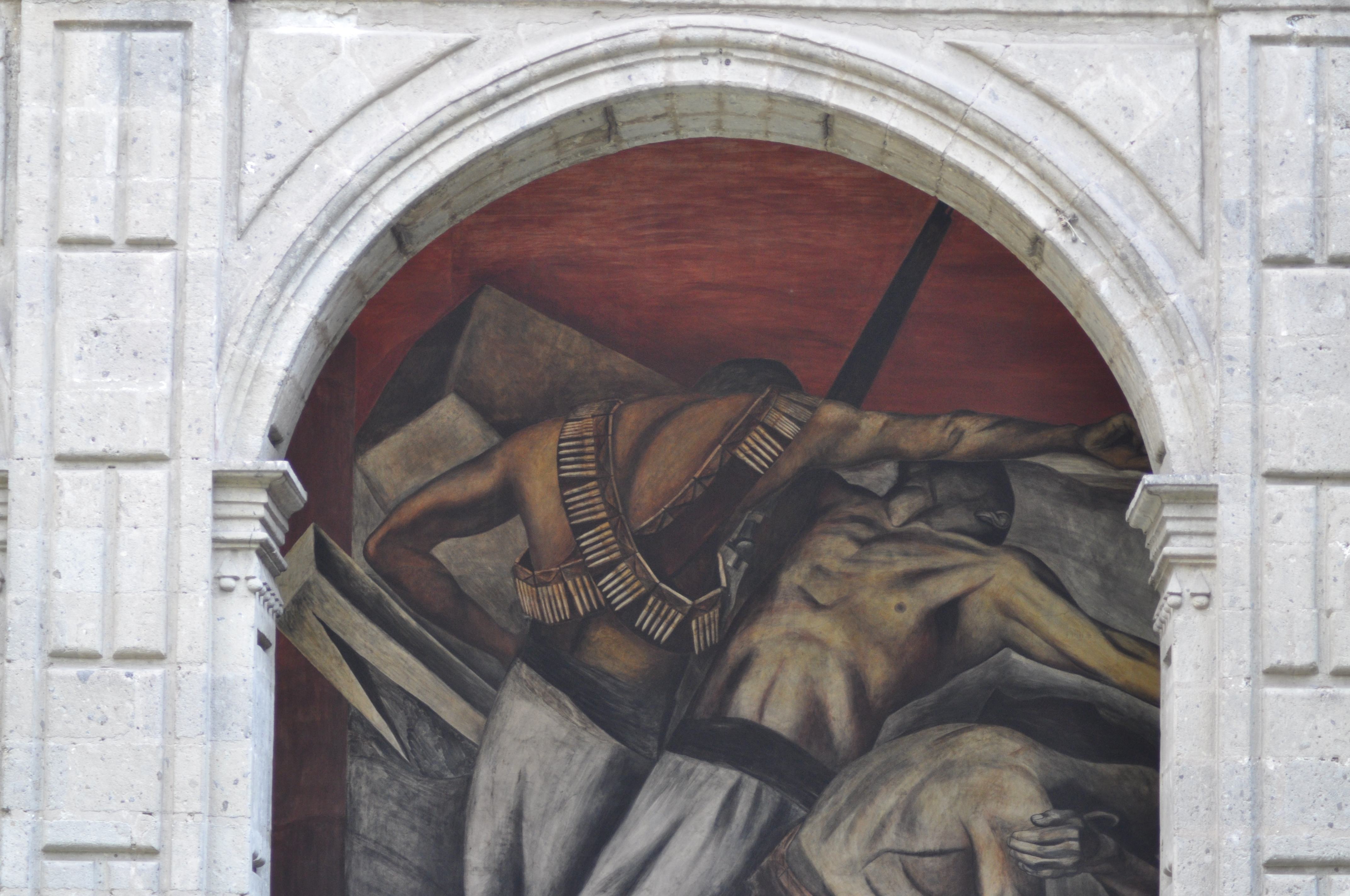 Colegio de San Ildefonso